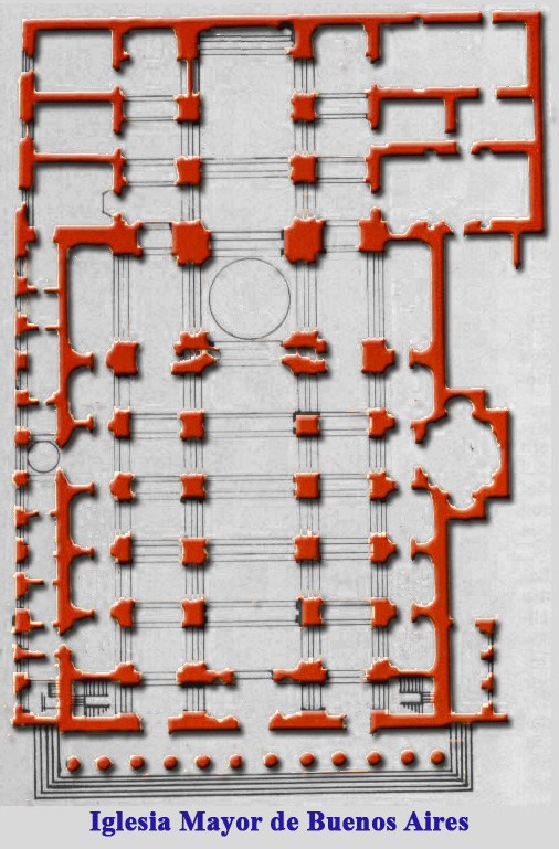 La Catedral Metropolitana de Buenos Aires es el principal templo católico de Buenos Aires, en Argentina. Se encuentra ubicada en la intersección de la calle San Martín y la avenida Rivadavia, del barrio porteño de San Nicolás, en frente a la Plaza de Mayo